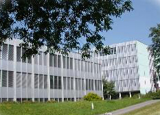 Interstaatliche Hochschule für Technik NTB Buchs SG, Schweiz